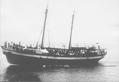 אוניית המעפילים מדינת ישראל